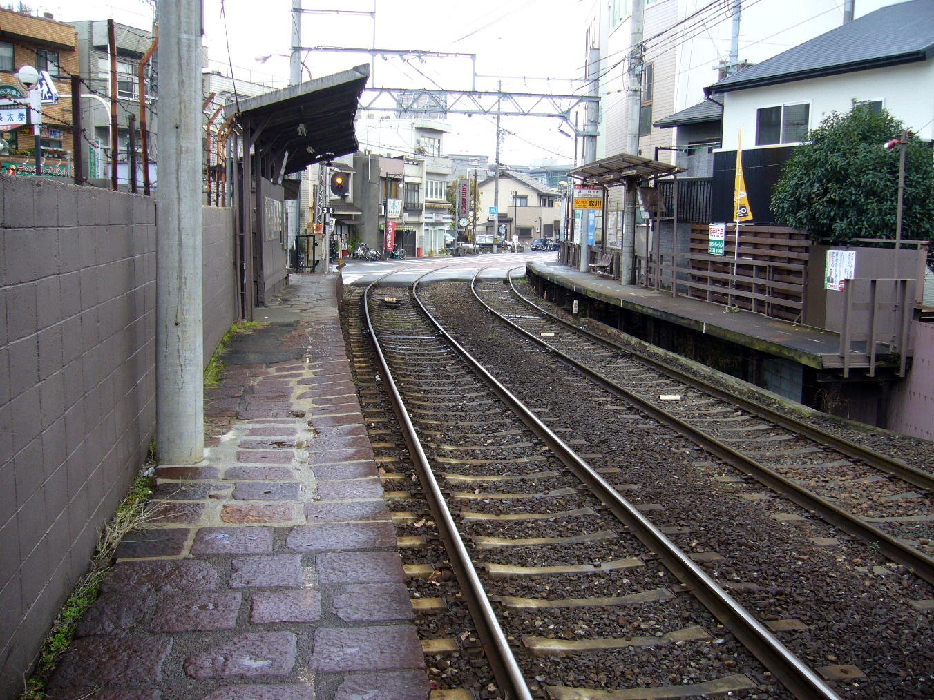 京福電気鉄道嵐山本線蚕ノ社駅の四条大宮駅方面行きホーム。。狭いホームであるが、2008年1月16日に京都市営地下鉄東西線の太秦天神川駅が開業して、同年3月下旬に嵐電天神川駅が開業するまでの間、地下鉄との乗換駅となり混雑が予想されたため、上屋の下に設置されていた建付けのベンチが撤去された。その後再び閑散とした駅となってもベンチは元の規模には復していない。2008年11月29日に投稿者が撮影。